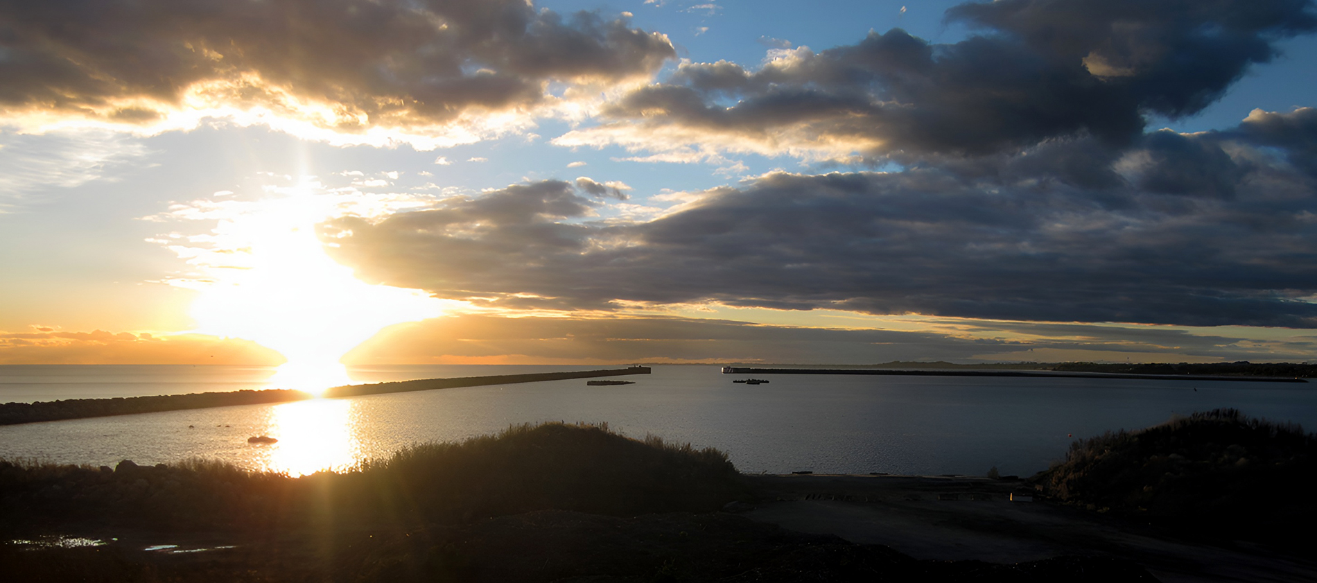 Solnedgång över Östra hamnbassängen. 27 okt 2012 Ystad.